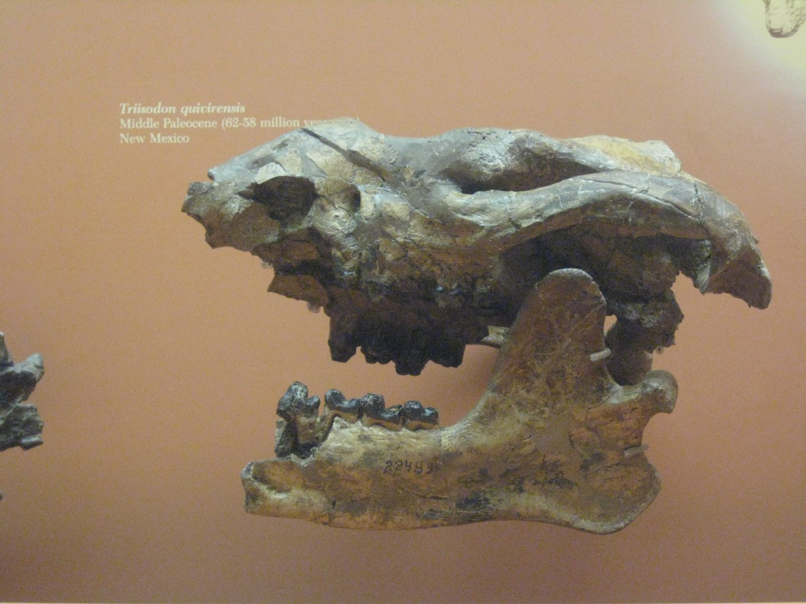 Triisodon quivirensis 62 - 58 mya, Middle Paleocene, New Mexico